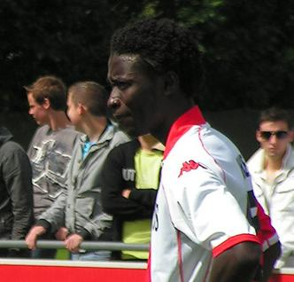 Ghanees voetballer Nana Asare in het tenue van FC Utrecht